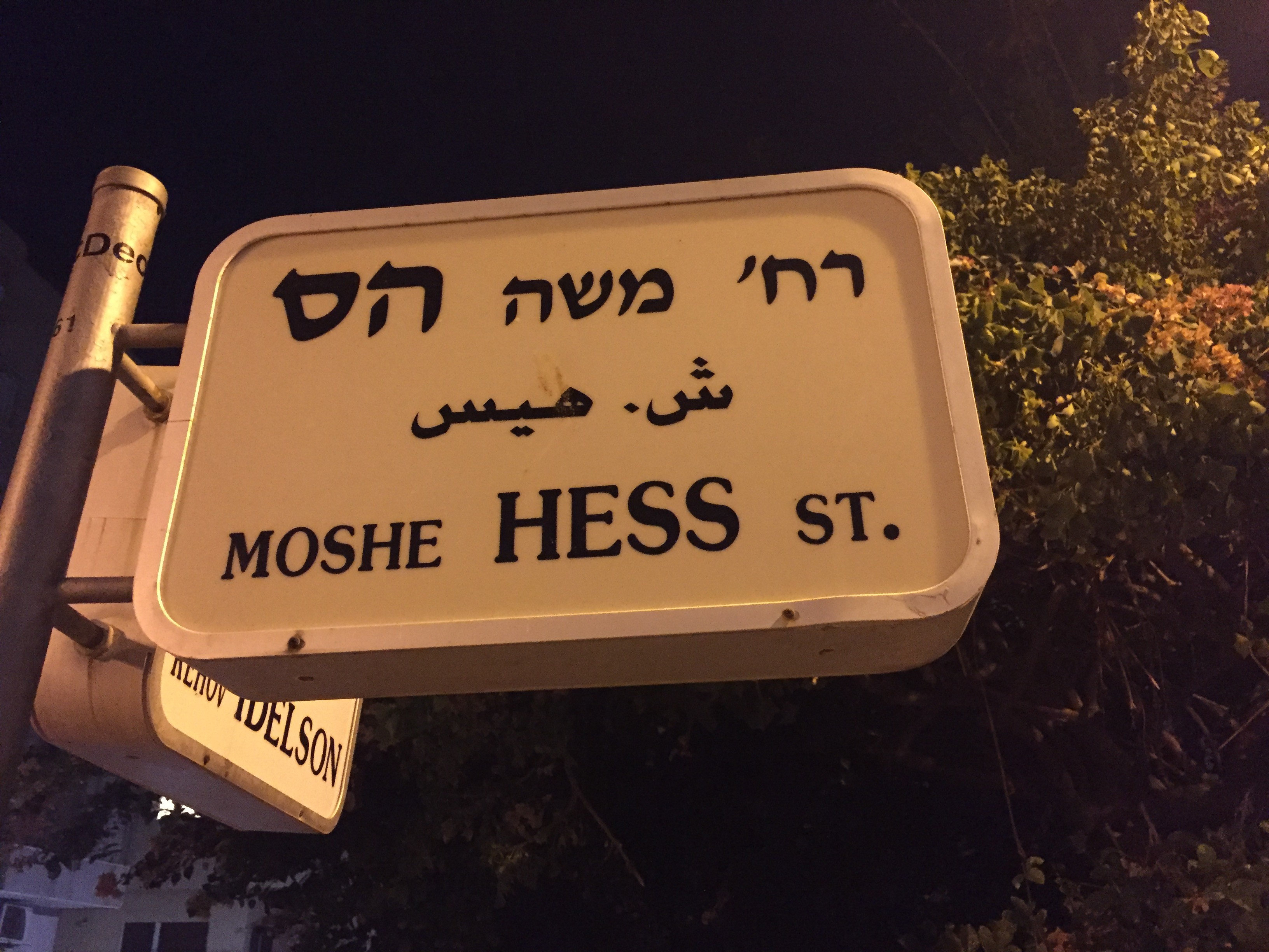 שלט רחוב בתל אביב על שמו של משה הס